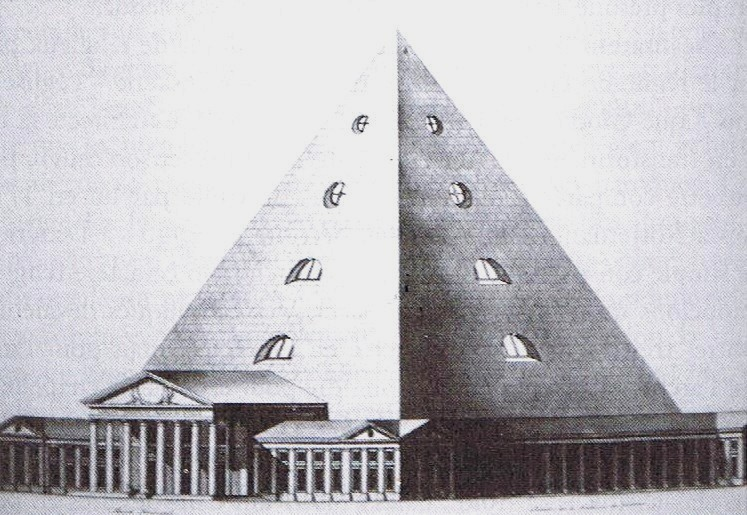 Projet de Palais des Sciences et des Arts à Amsterdam (projet d'Abraham Van der Hart en 1809). On peut trouver cette image dans l'étude d'Annie Jourdan, Louis Bonaparte, roi de Hollande.